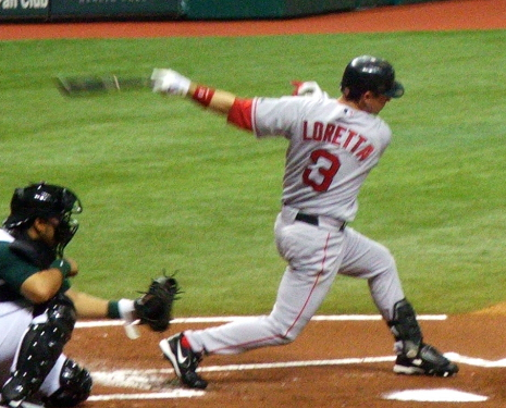 Mark Loretta